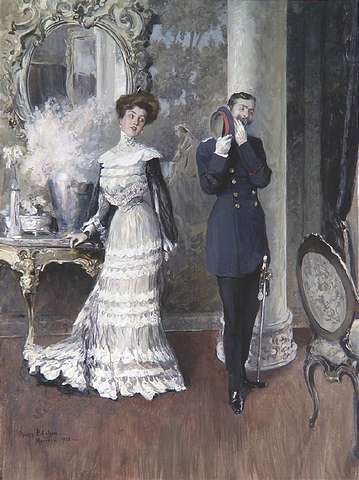 Oscar Bluhm: Ermüdende Konversation, 41 x 31 cm